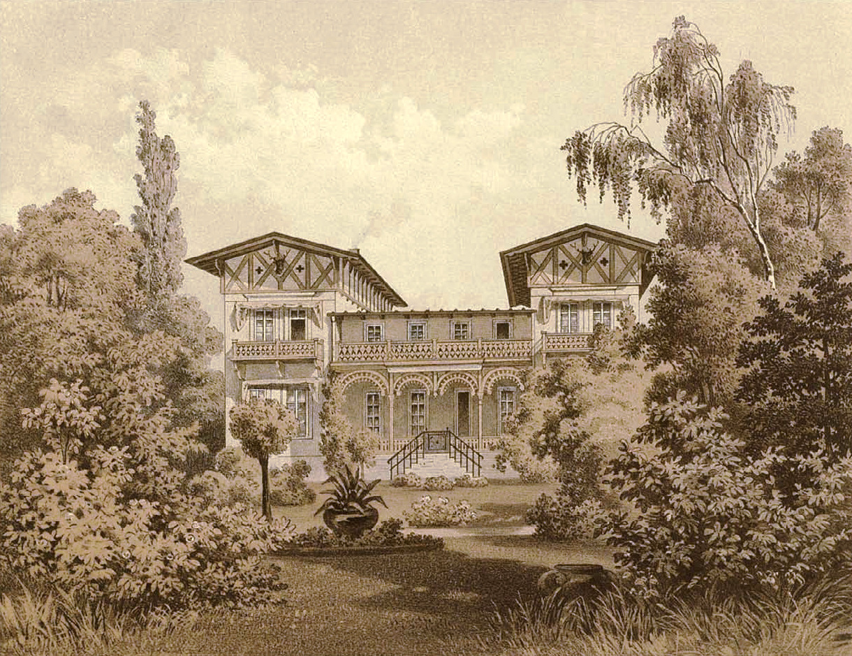 Rittergut Laasow, Kreis Calau, Provinz Brandenburg, Lithografie aus dem 19. Jahrhundert